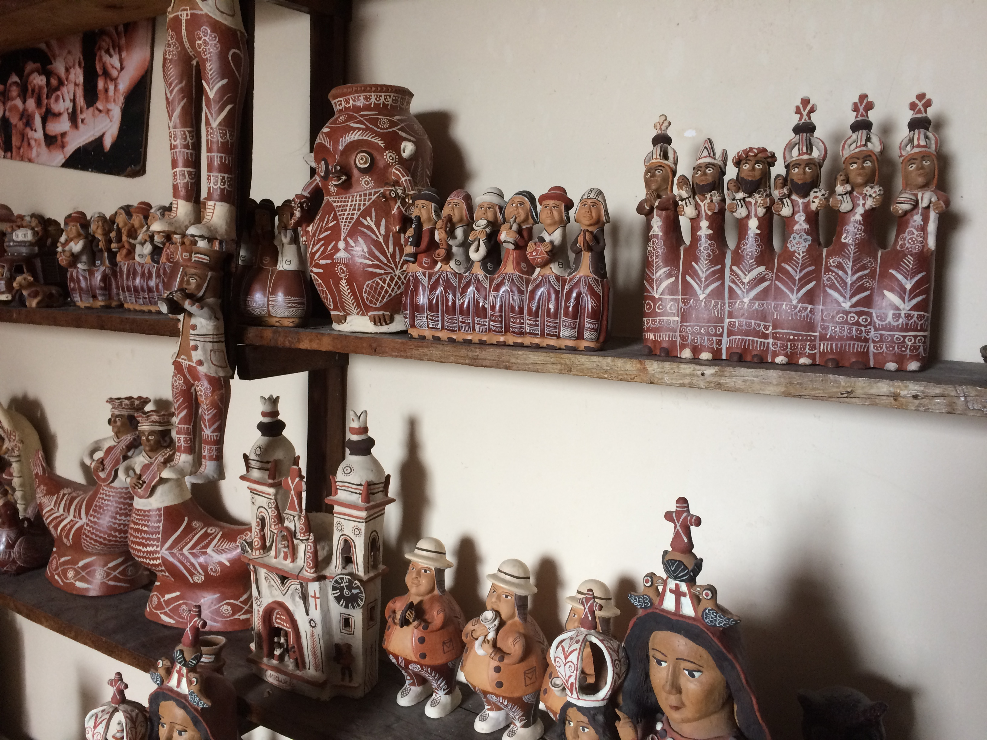 Mamerto Sánchez Cárdenas taller